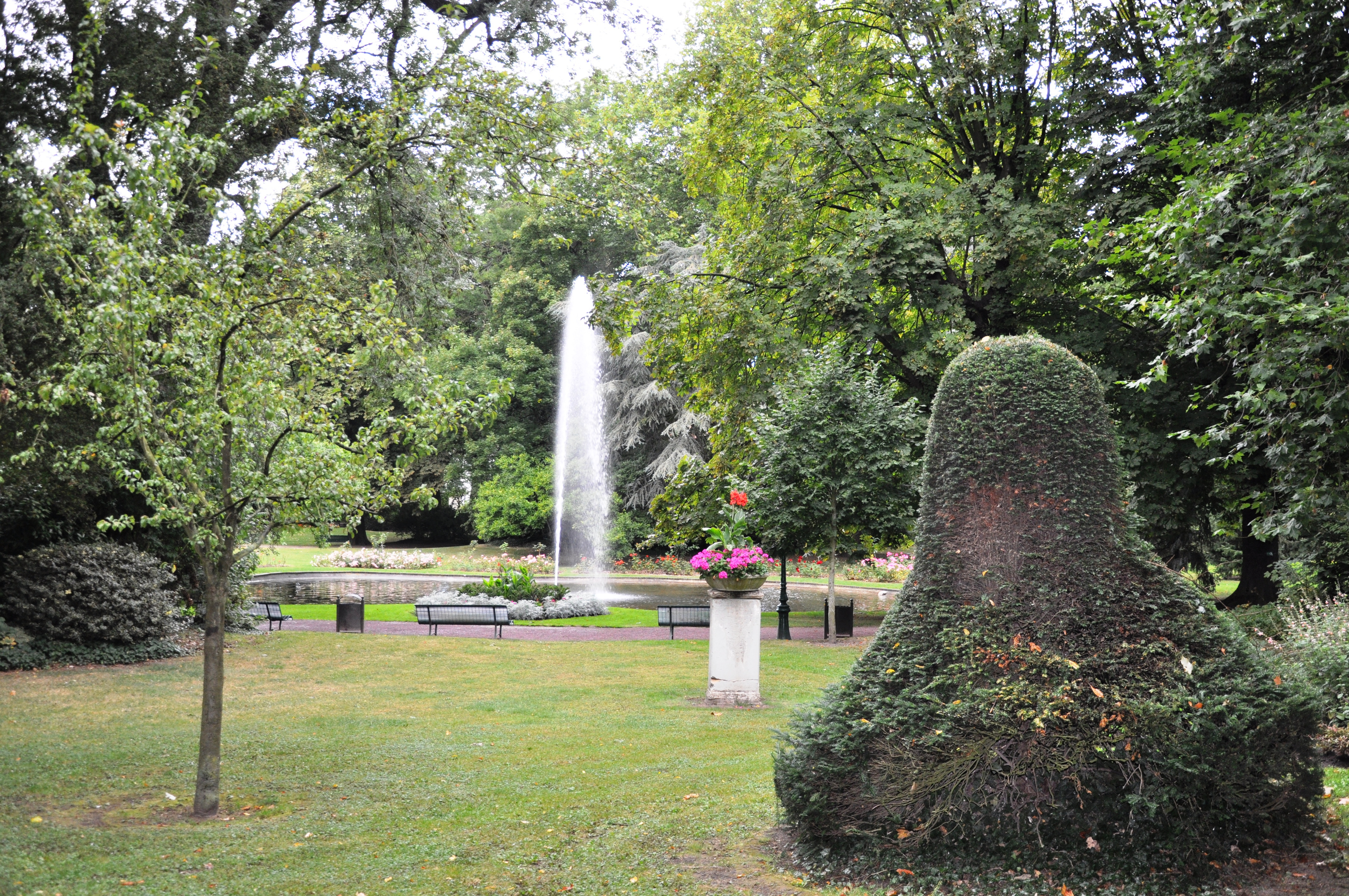 Jardin public de Béthune, (Inscrit, 1975) .